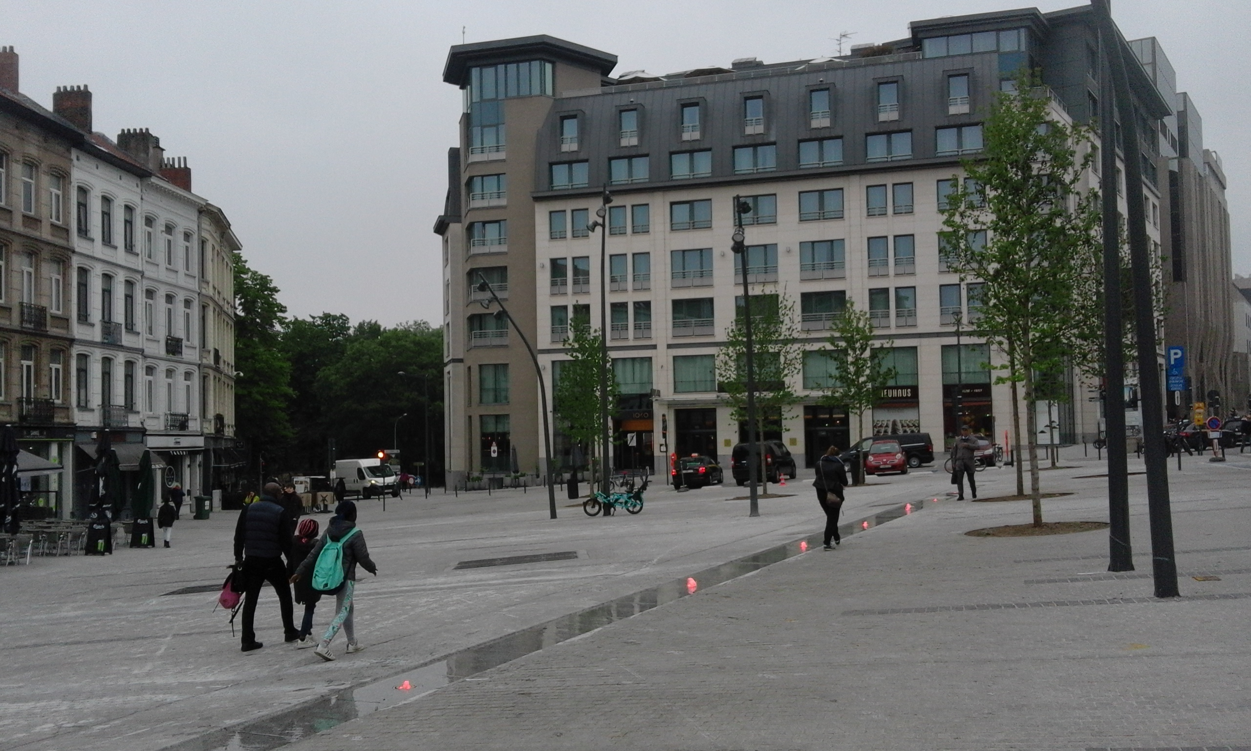 Place Jourdan, à Etterbeek, en Région bruxelloise, après la rénovation en 2019